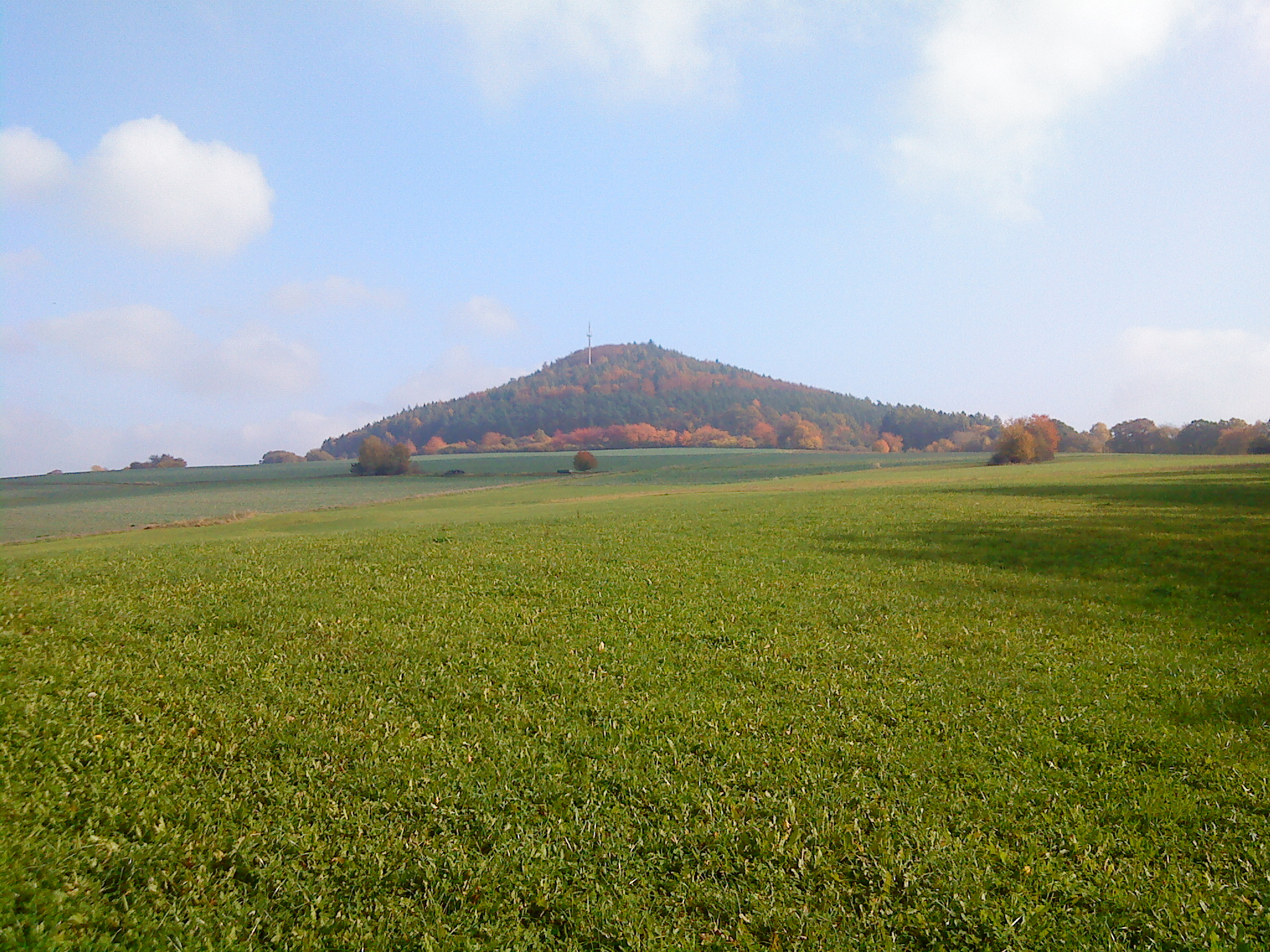 Der Reuschberg bei Schöllkrippen